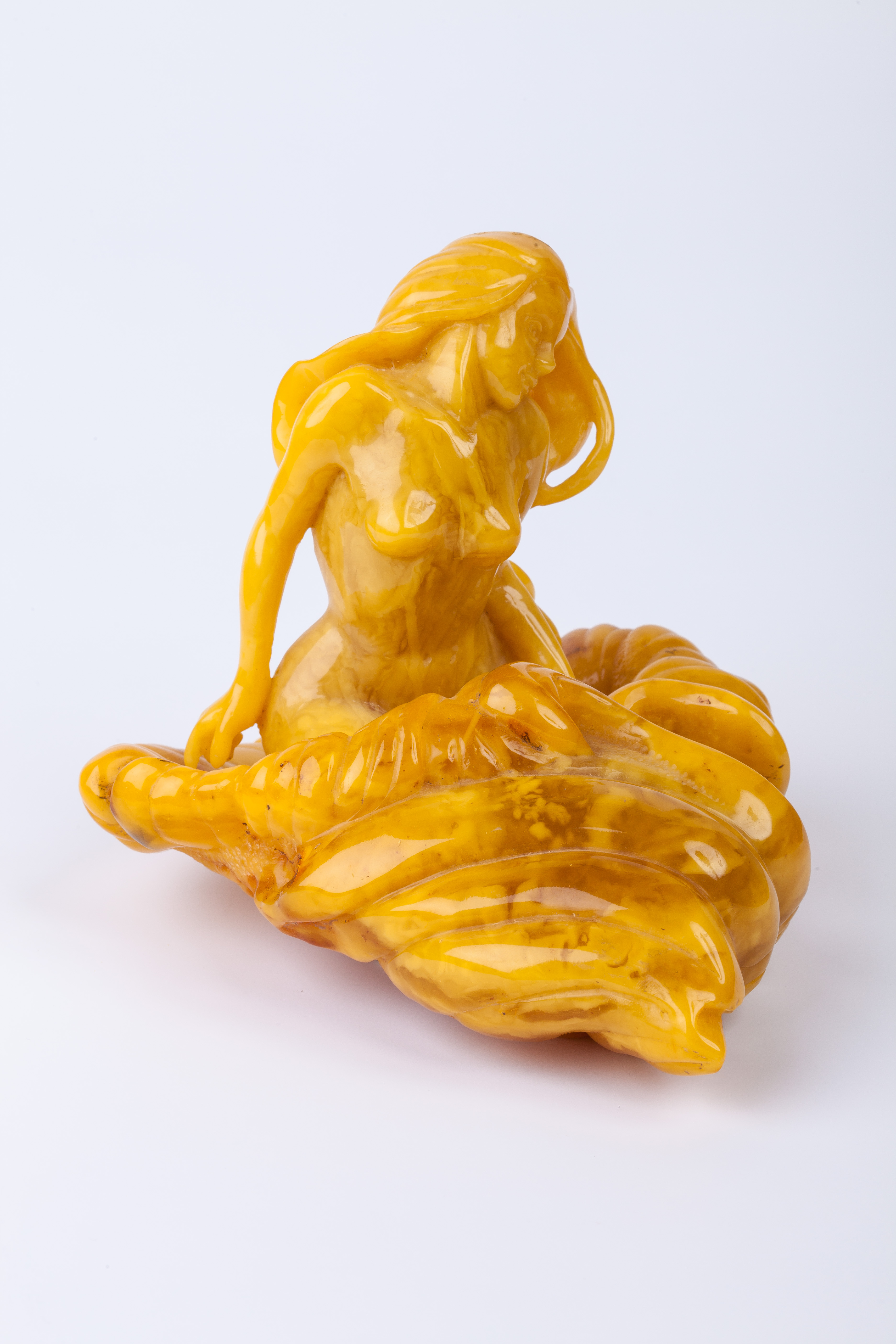 «Рождение Венеры», Эрнест Абрамович Лис, главный художник Янтарного комбината. Начало 2000-х. Из собрания демонстрационного зала Калининградского Янтарного комбината.